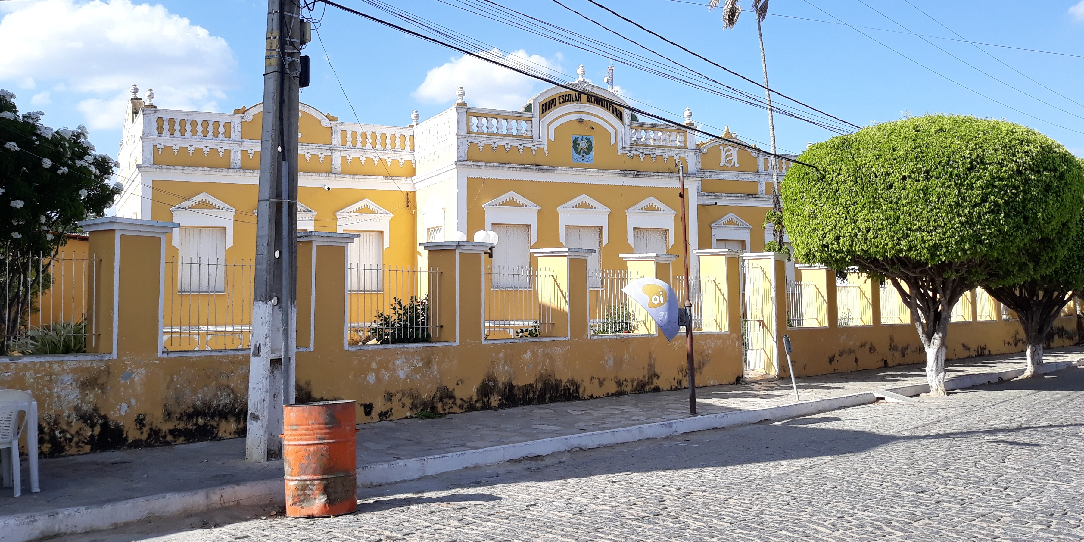 Escola Estadual Almino Afonso em Martins, Rio Grande do Norte (Brasil)